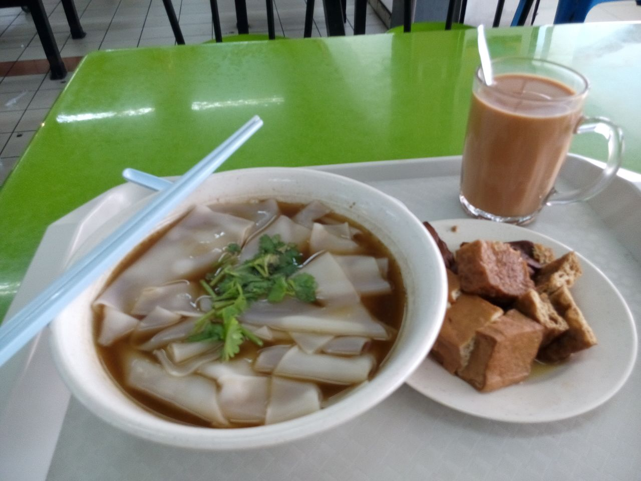 Pengganti daging